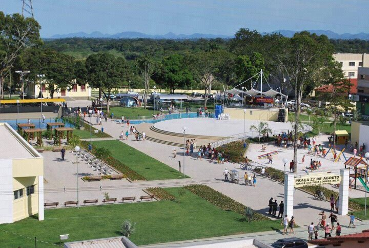 Nesta foto podemos observar a Praça Vinte e Dois de Agosto, onde o município de Linhares se ergueu e então ela se tornou a primeira praça do município.